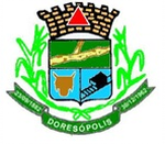 Este e o Brasão correspondente ao município de Doresópolis no Estado de Minas Gerais